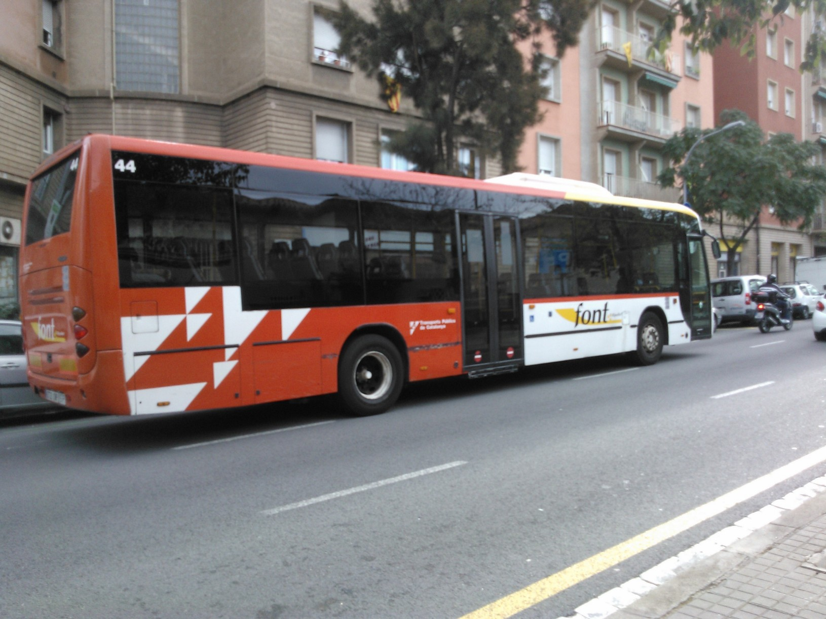 Autobús interurbà/urba a Barcelona